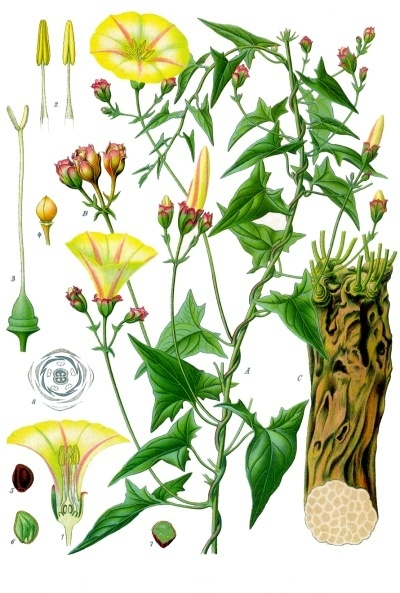 Purgierwinde. A blühende Pflanze; B Fruchtzweig; C Wurzel; 1 Blüte im Längsschnitt; 2 Staubblätter von der Bauch- und Rückenseite; 3 Pistill; 4 Kapselfrucht; 5 Samen; 6 derselbe im Längsschnitt; 7 derselbe im Querschnitt; 8 Diagramm der Blüte. A, B, C, 1, 4 in natürlicher Grösse; 2, 3, 5, 6, 7 vergrössert.